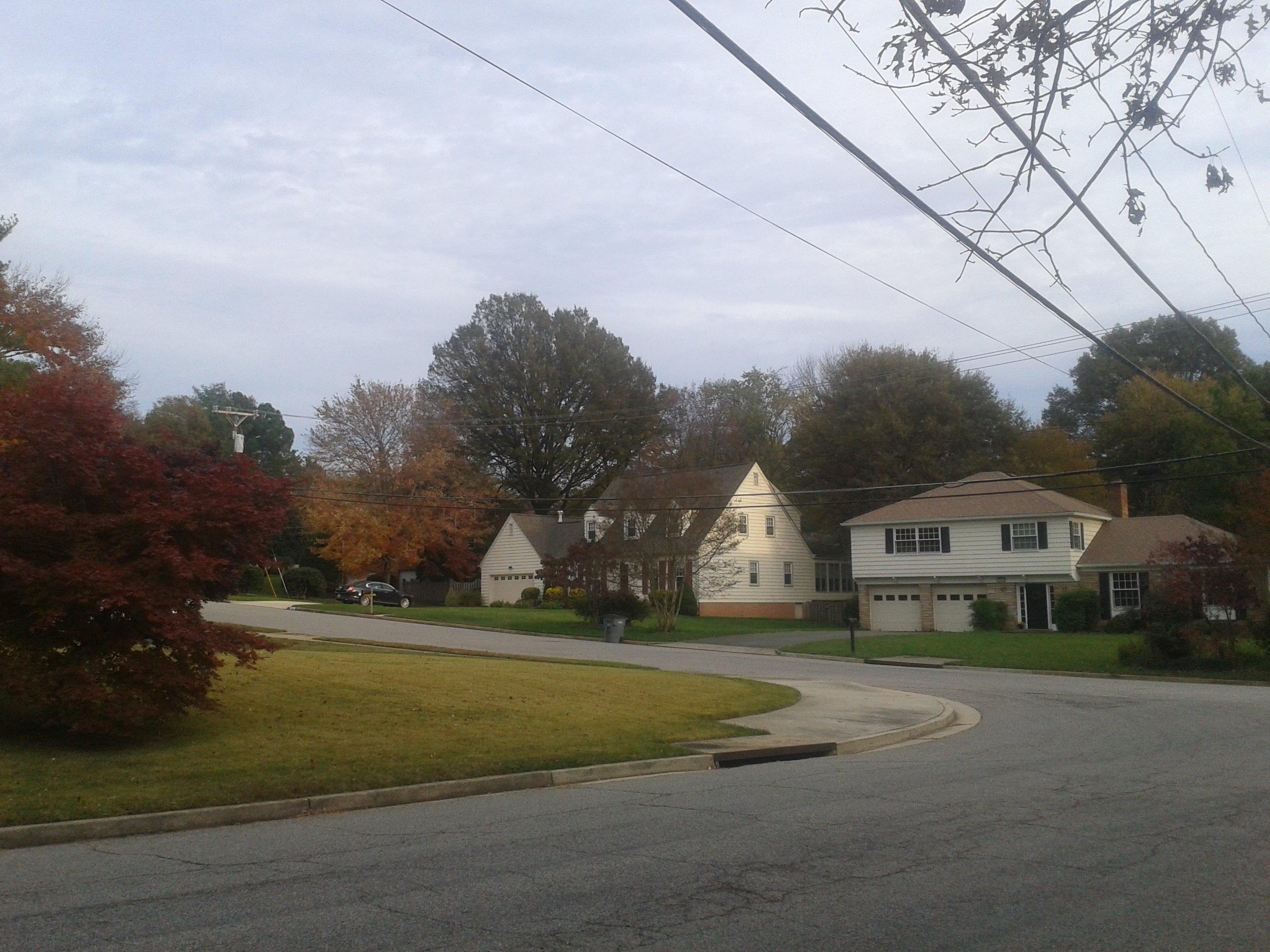 Vesnice u Mount Vernon, Virginia, USA